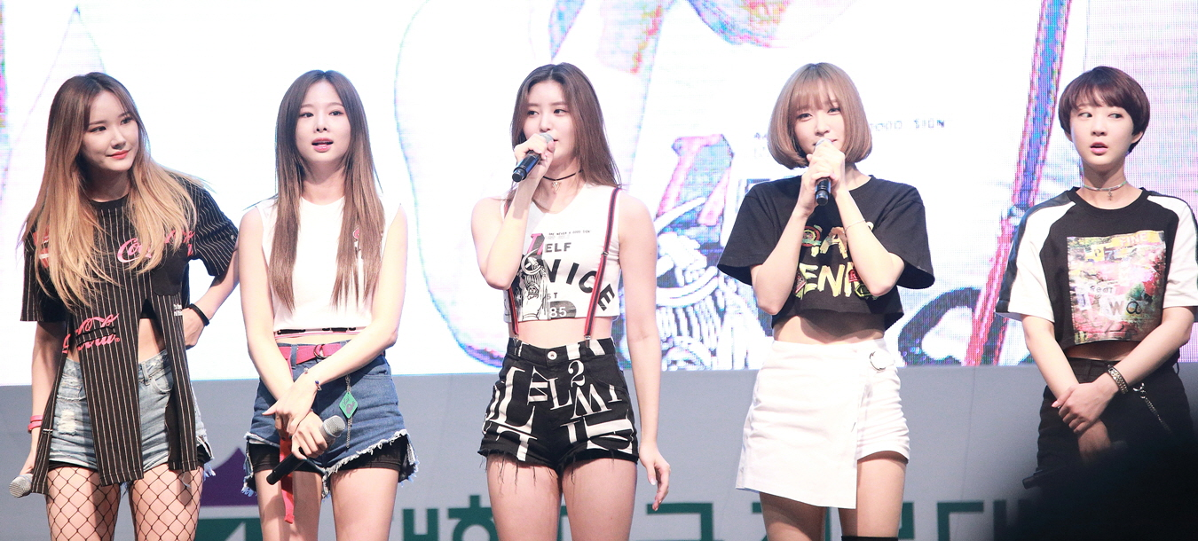 160714 조윤희의 볼륨을 높여요 - EXID 직찍